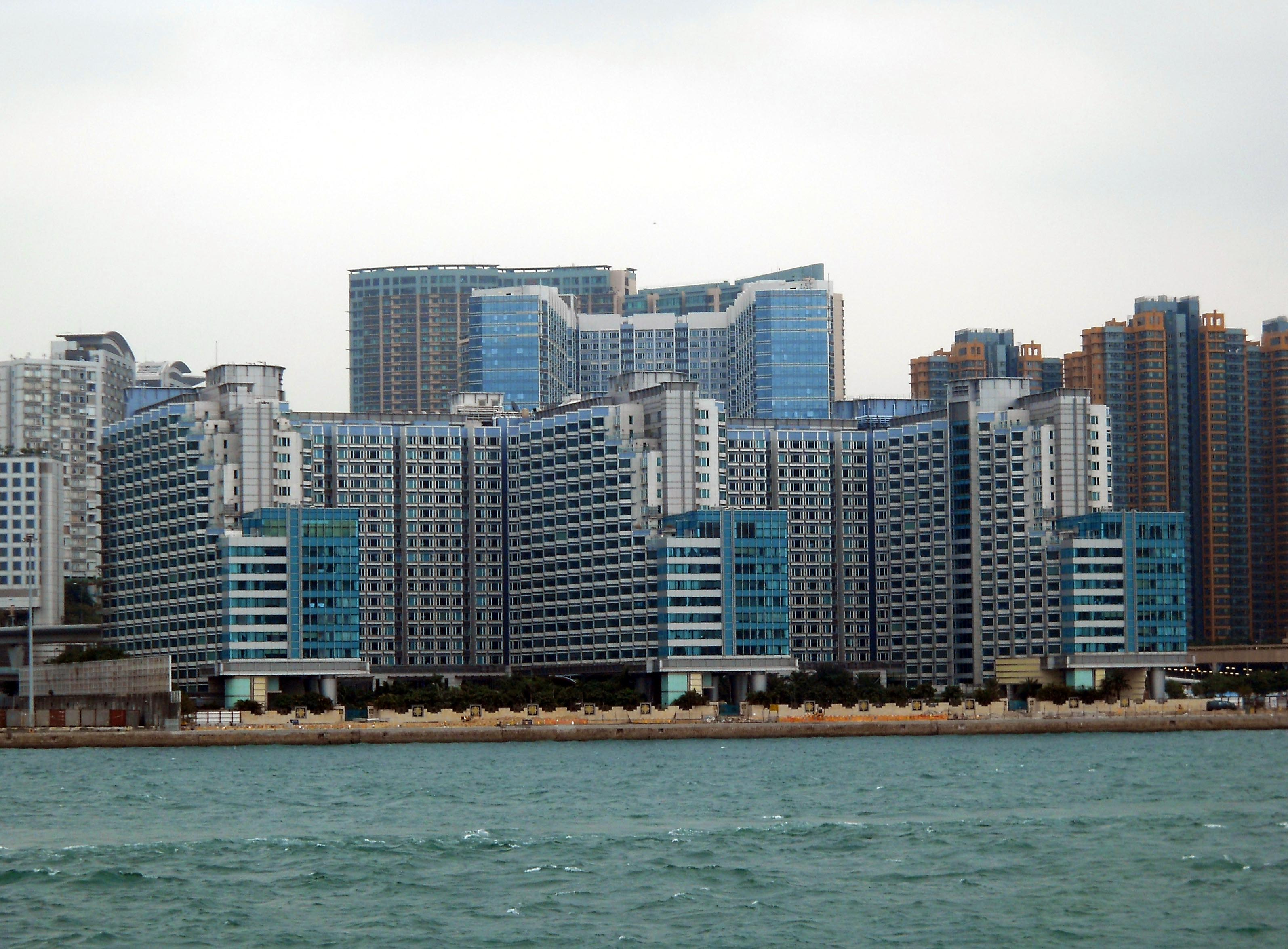 中文（香港）: 海灣軒